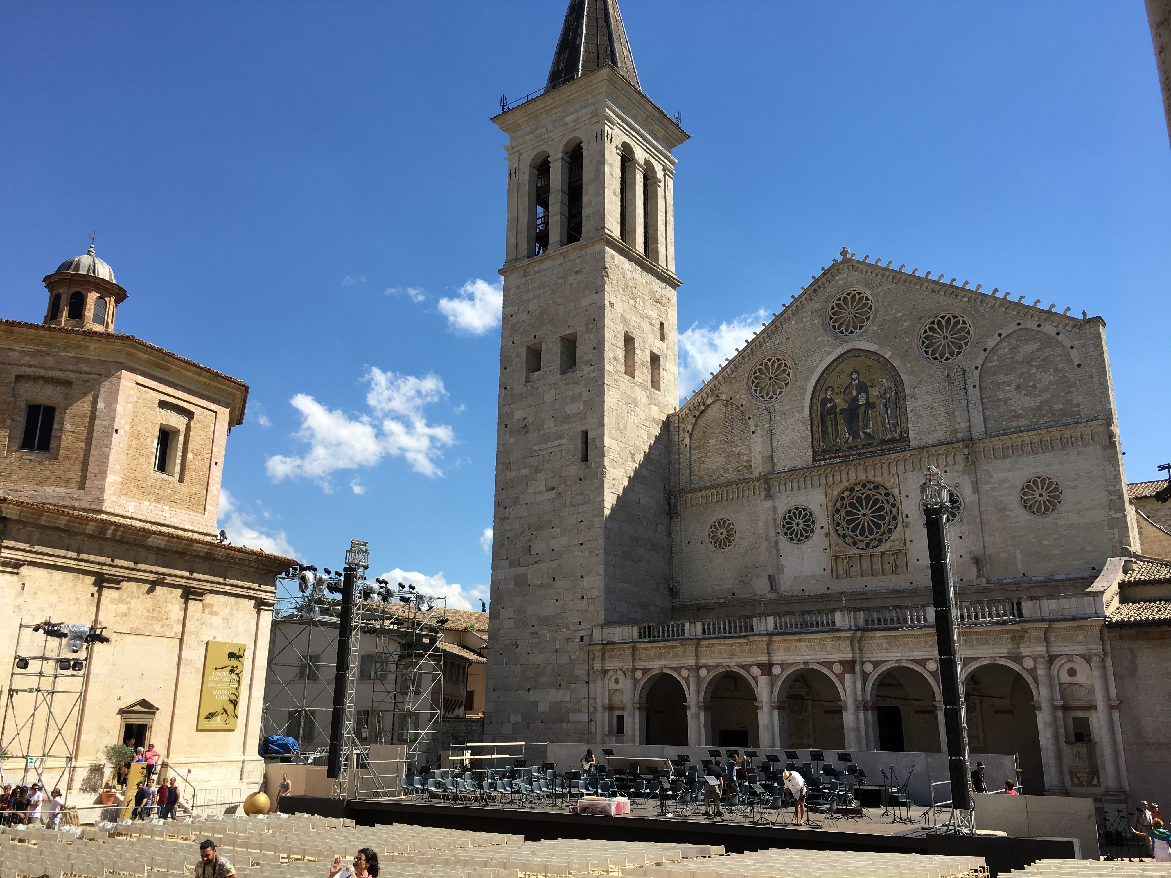 Spoleto. Allestimento concerto in piazza, festival 2017